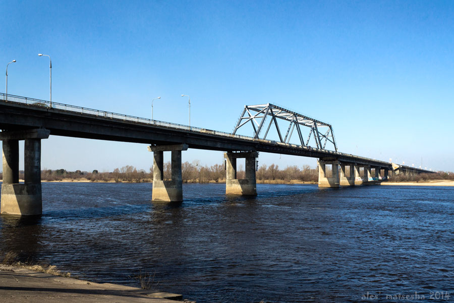 Мазыр. Мост цераз Прыпяць - самы доўгі аўтамабільны мост у Беларусі